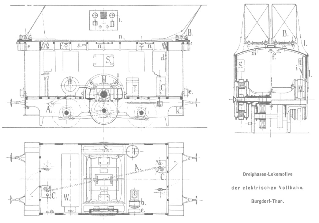 De 2/2 der Burgdorf-Thun-Bahn: Typenskizze Legende der elektrischen Ausrüstung A Antrieb der Widerstände B Kontaktbügel C Kontroller M Fahrmotoren T Transformator S Blechschrank mit Sicherungen W Anfahrwiderstand a Blitzschutzapperatur b Kompressormotor c Automatischer Ausschalter Kompressormotor d Ausschalter Kompressormotor e Signallaternen f Beleuchtungskörper g Hauptamperemeter i Schaltbrett k Steckkontakte mit Anschlusskabel l Vorrichtung zum Senken der Kontaktbügel m Arretierhaken für Kontaktbügel n Leitungskanäle